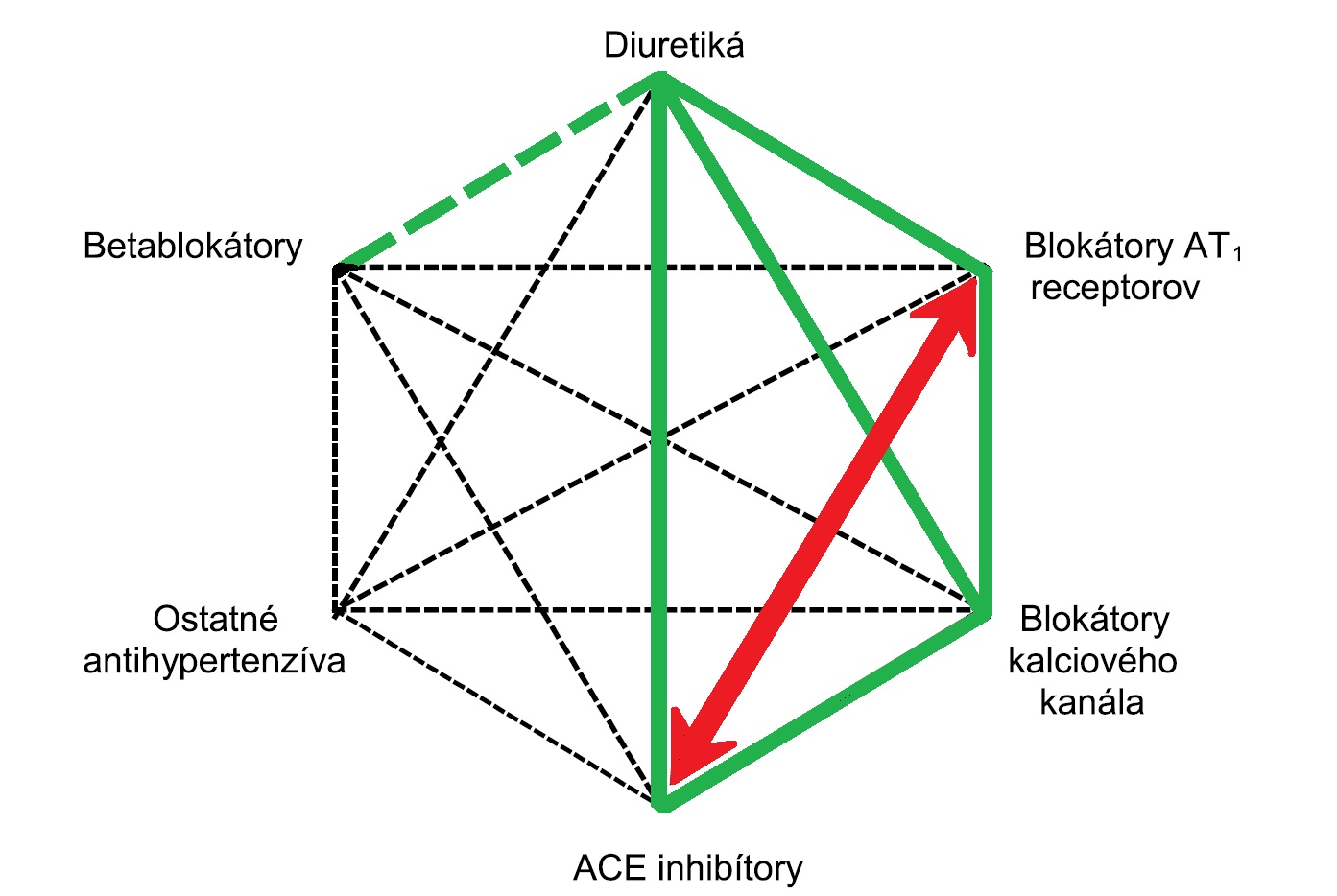 Možné kombinácie antihypertenzív: zeleno vyznačené sú preferované, červeno vyznačené nevhodné, ostatné sú možné.